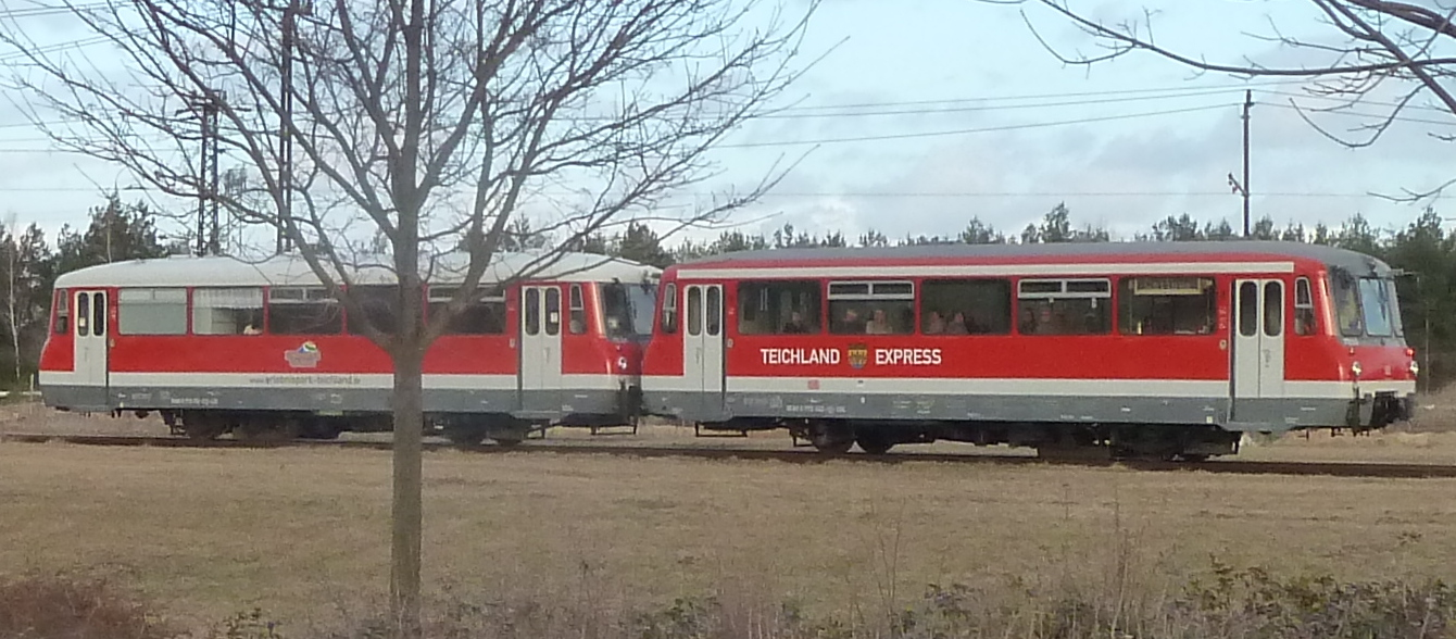 Diese Ferkeltaxen-Garnitur des Lausitzer Dampflok-Clubs e. V., „Erlebnispark-Teichland“ (772 332) und „Teichland-Express“ (772 342), stand am 15. März 2014 vor dem Kraftwerk Boxberg. Auf dem Foto befindet sich die Garnitur bereits auf dem Rückweg mit „Cottbus“ in der Zielanzeige.